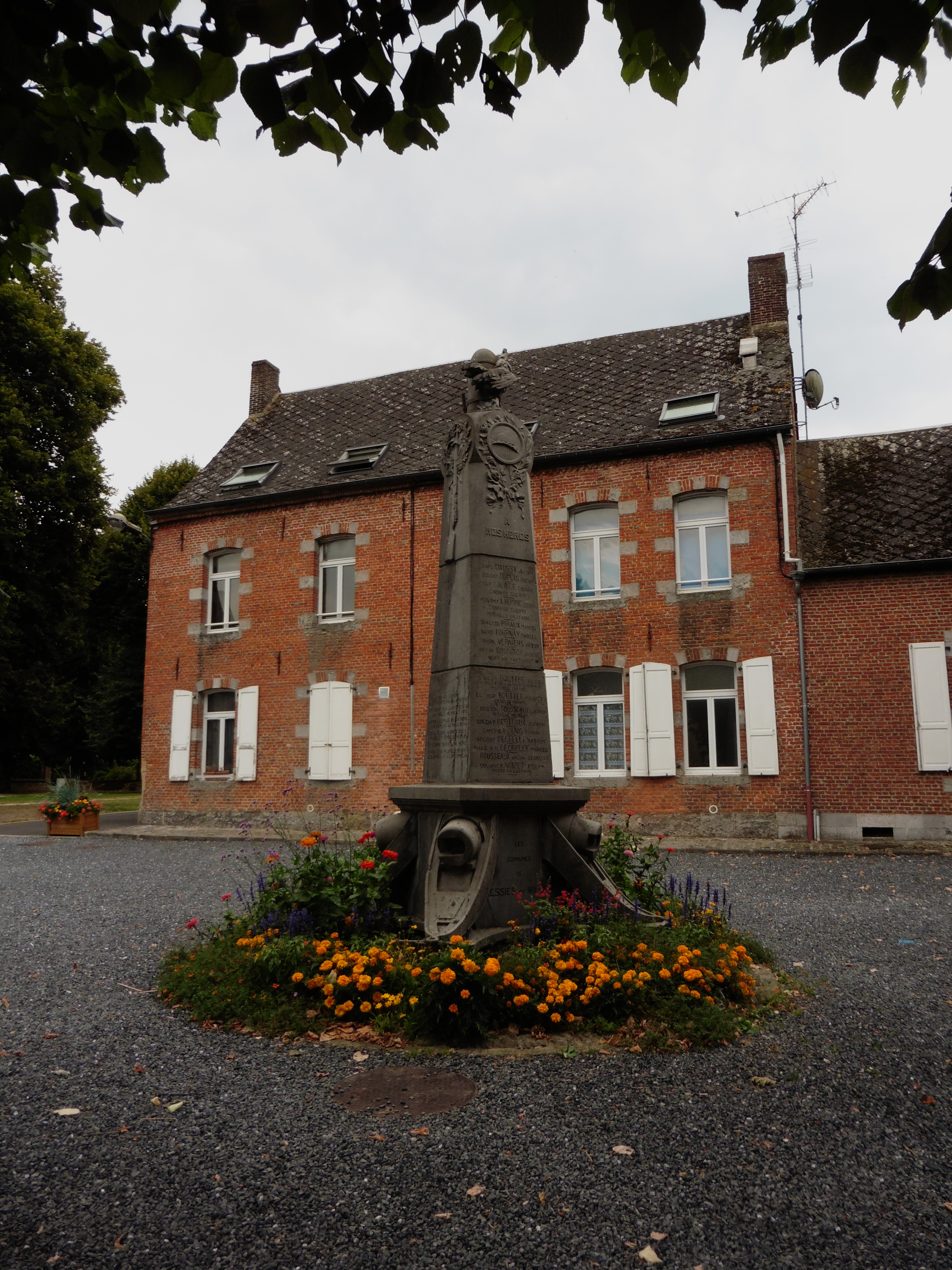 La mairie et le monument aux Morts.- 7 Rue du Maréchal Foch, Liessies Nord.- France.